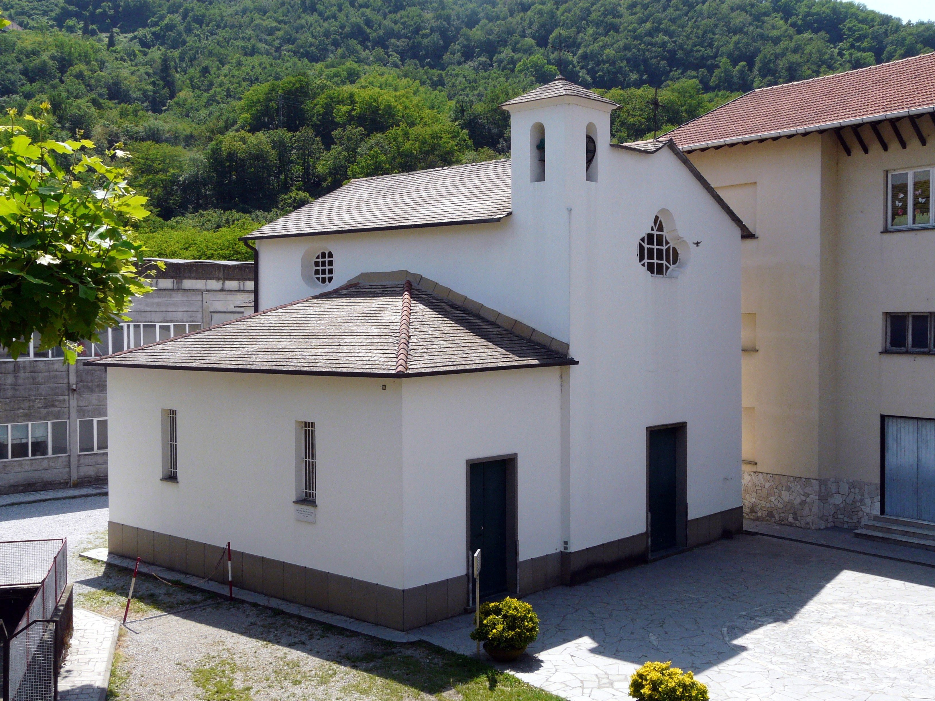 La cappella di San Lorenzo a Calvari, San Colombano Certenoli, Liguria, Italia